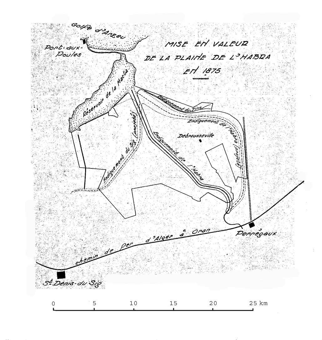 Carte d'après Pochet in Simoneau (1952). St Denis du Sig correspond à la ville du Sig, Perrégaux à Mohammadia et celle de Port-aux-Poules à celle de Mers El Hadjad. L'endiguement de l'oued Sig, pojeté en 1875, a été réalisé ultérieurement. La digue s'est rompue - sans doute lors des innondations de décembre 1969 - ce qui a permis aux marais de la Macta de redevenir une zone humide d'importance internationale.